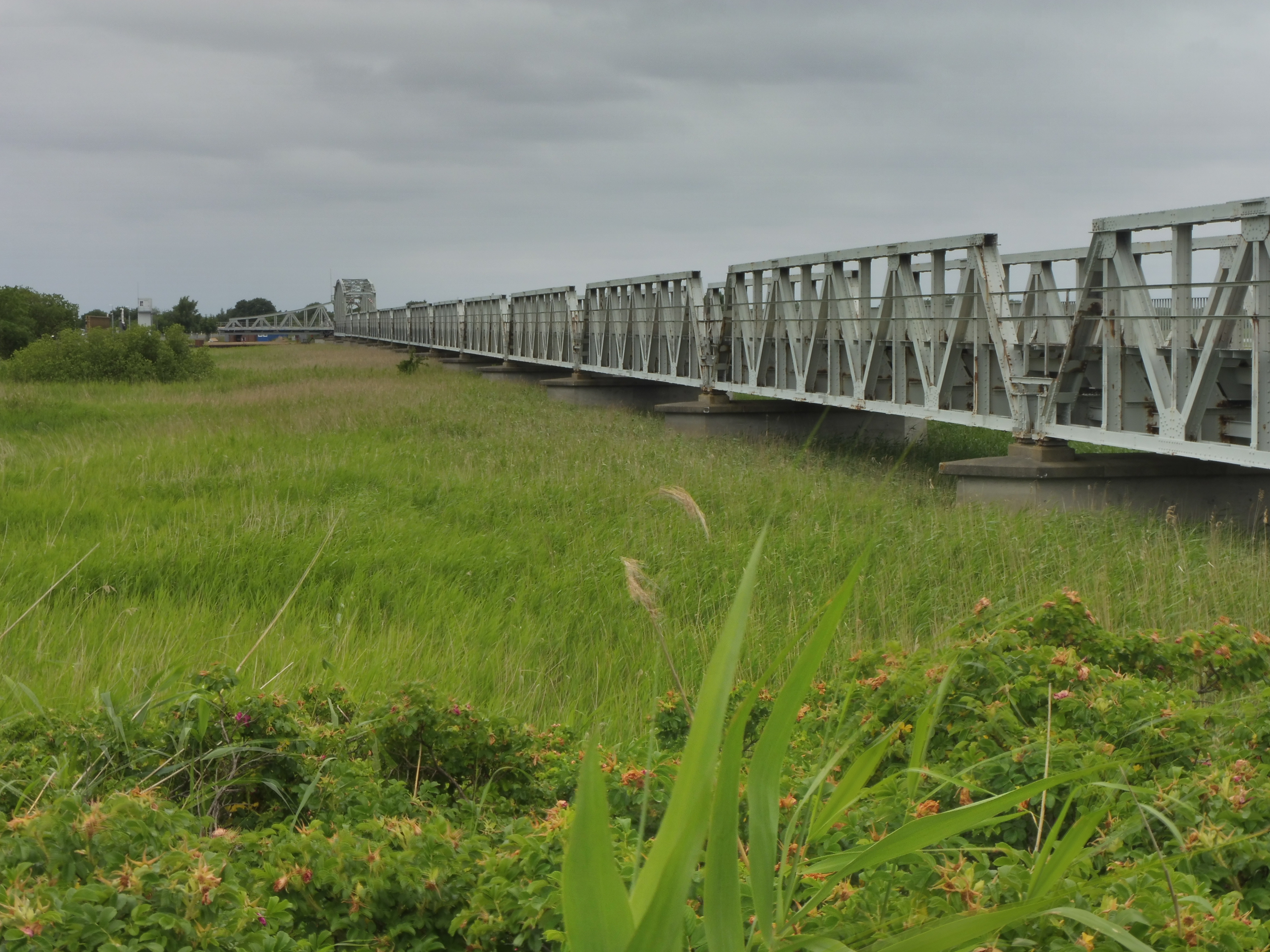 Westseite der südlichen Rampe der Meiningenbrücke